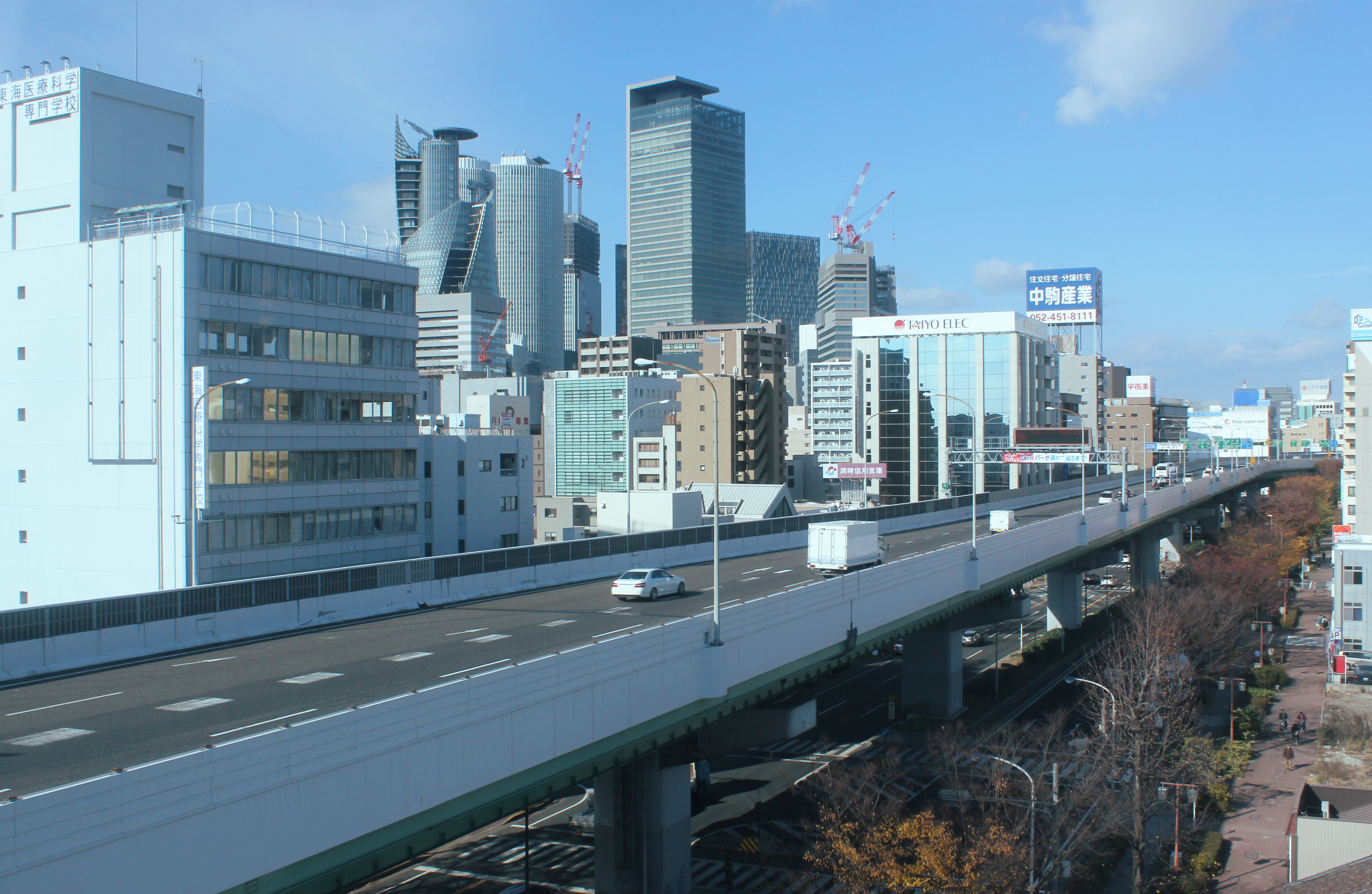 名古屋高速都心環状線 電気店屋上から撮影（店舗内撮影はNGですが屋上による風景撮影は住宅街方向以外は可とのことです）